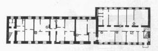 План 1-га паверха Полацкага кляштара францысканцаў